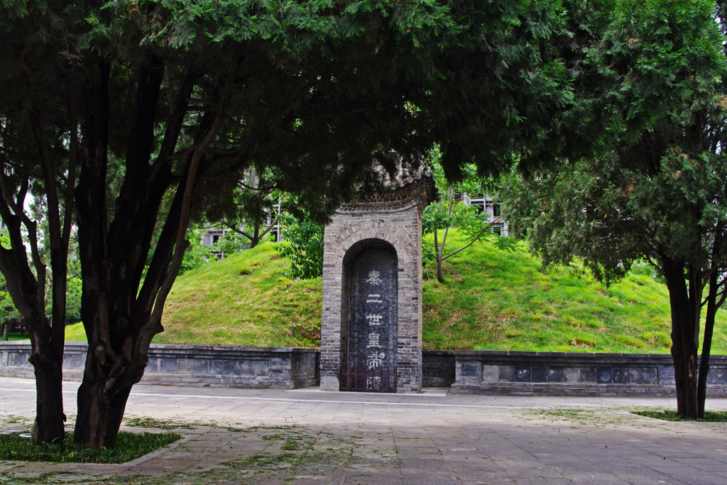 秦二世胡亥墓